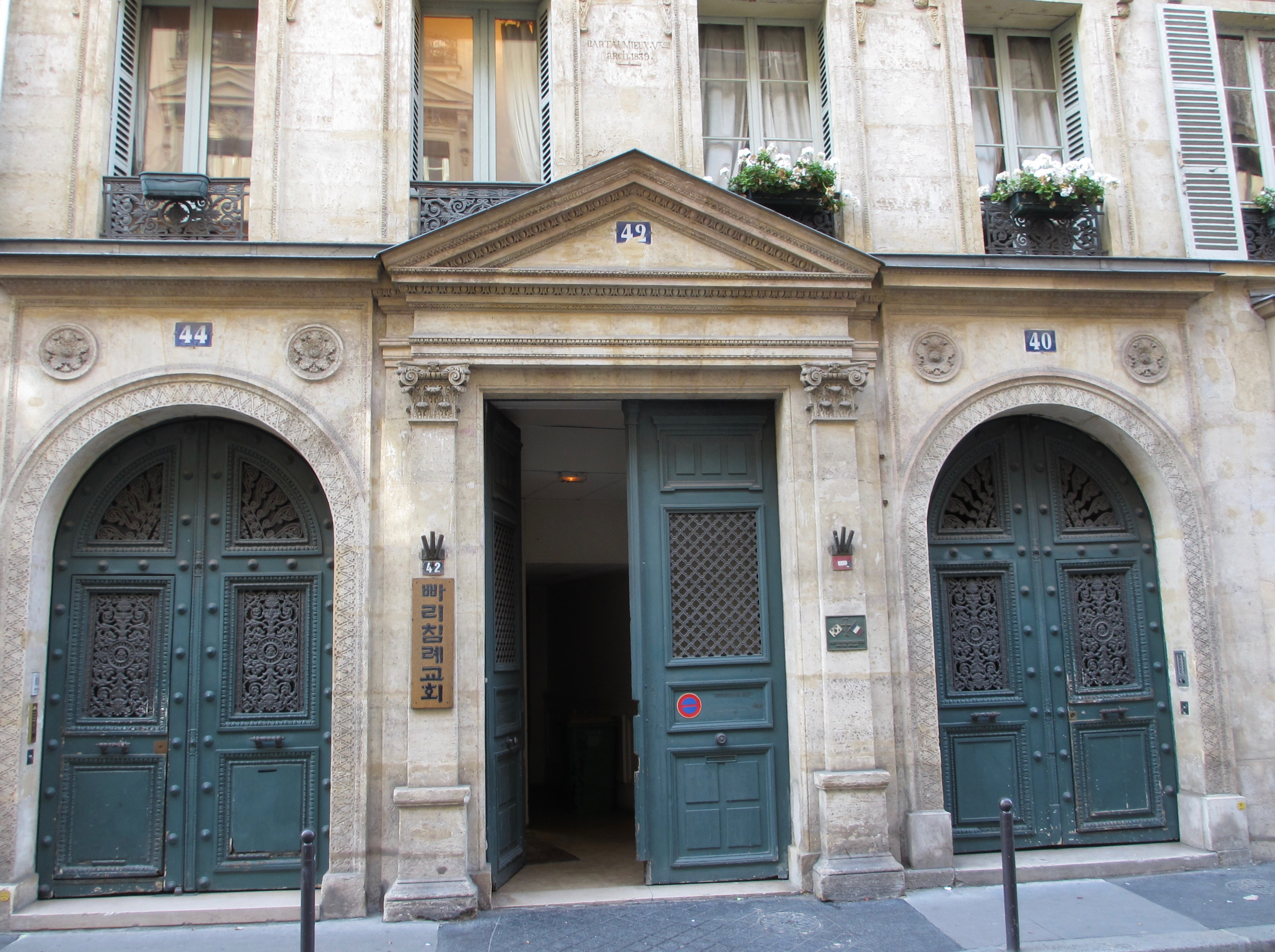 Église évangélique baptiste coréenne - 42 rue de Provence Paris 9e. Ancienne chapelle réformée Taitbout et ancienne salle centrale de l'Armée du Salut